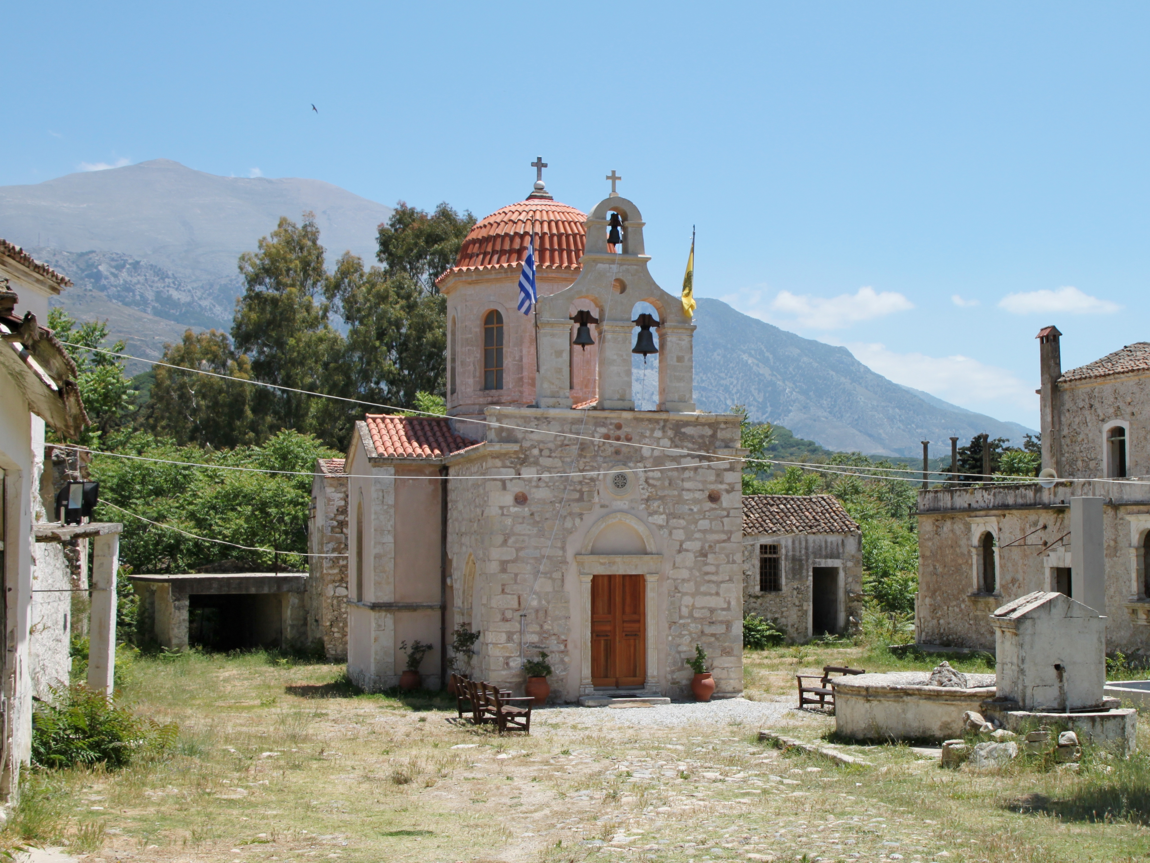 Kloster Moni Asomaton im Amari-Becken, Gemeinde Syvritos, Präfektur Rethymno, Kreta, Griechenland